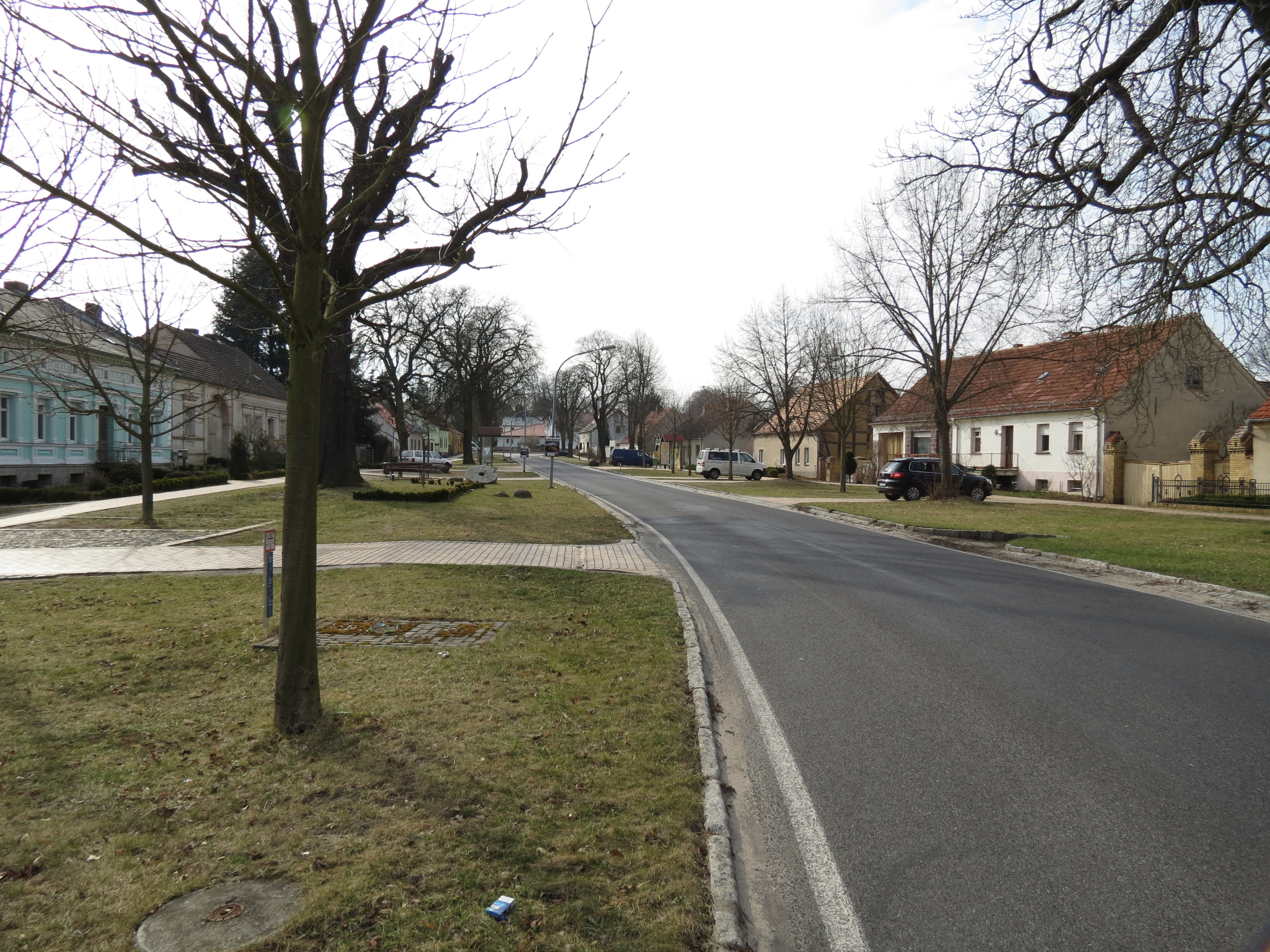 Klausdorf, Gem. Am Mellensee, Lkr. Teltow-Fläming, Brandenburg, Deutschland, Dorfaue, Blick nach Westen